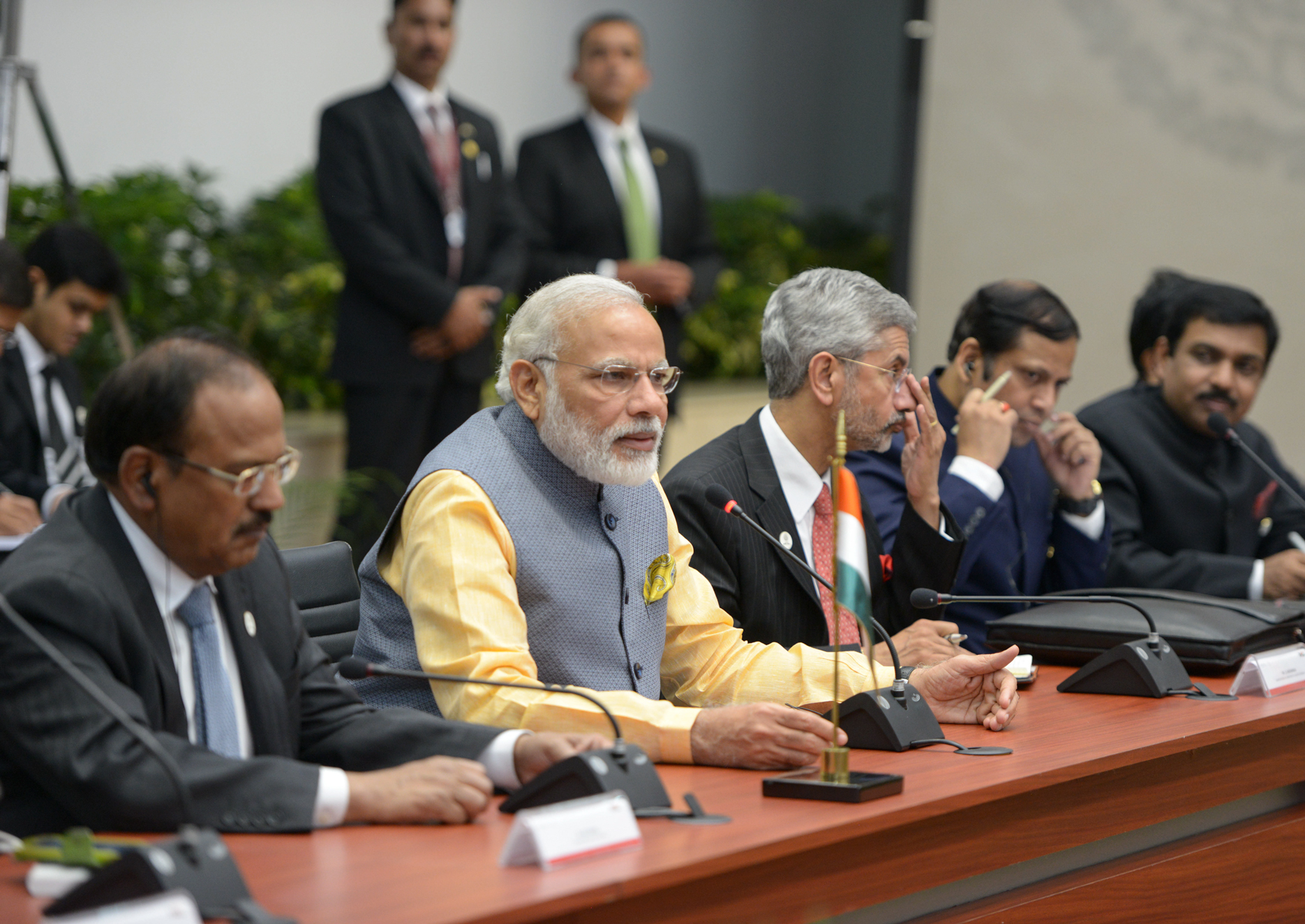 El Presidente Enrique Peña Nieto recibió al Excelentísimo Señor Narendra Modi, Primer Ministro de la República de la India, quien realizó una Visita de Trabajo en México.